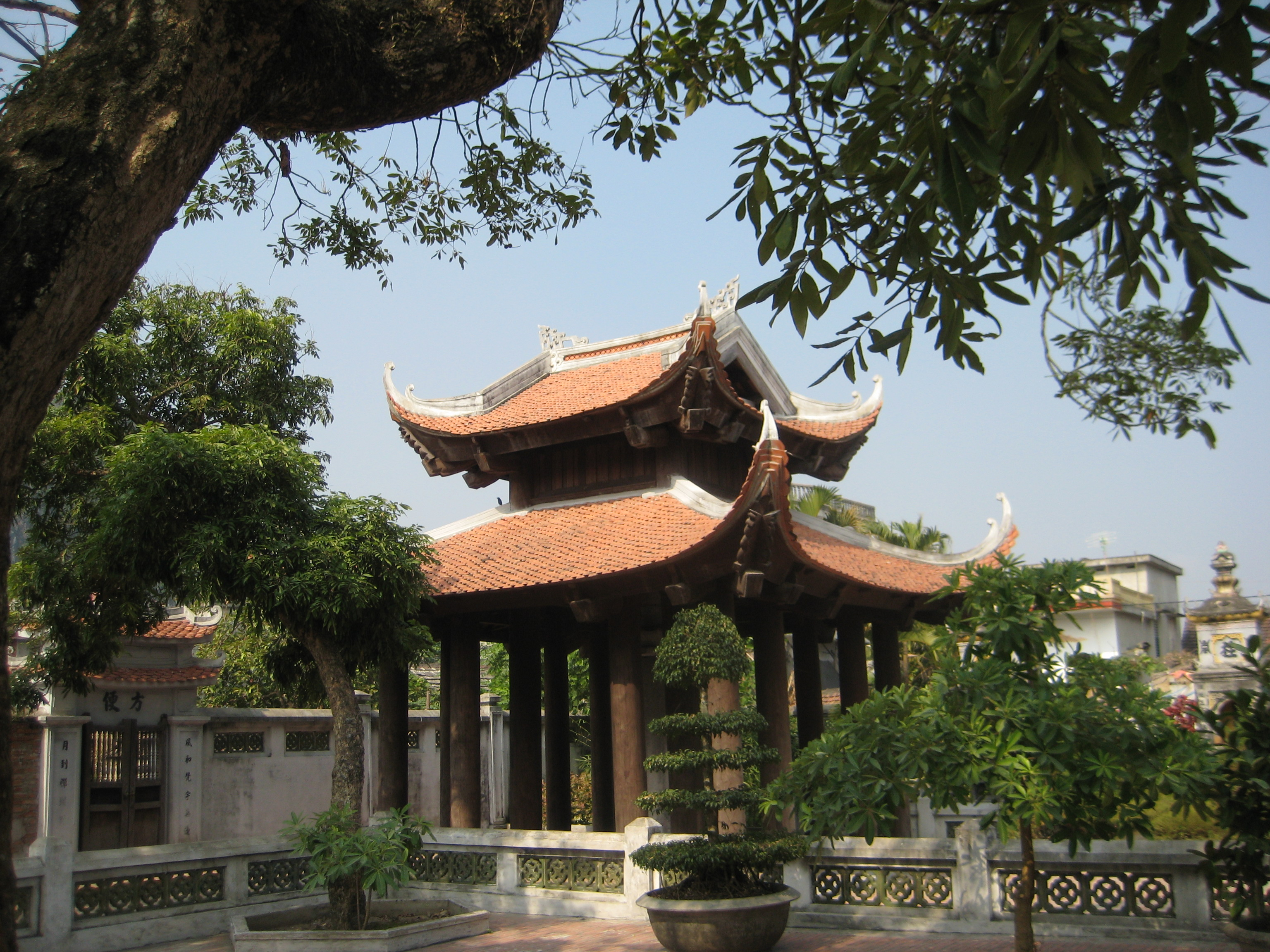 Nhất Trụ tự (Tràng An), nơi bảo quản 100 cột kinh Phật Đảnh Tôn Thắng Đà La Ni.